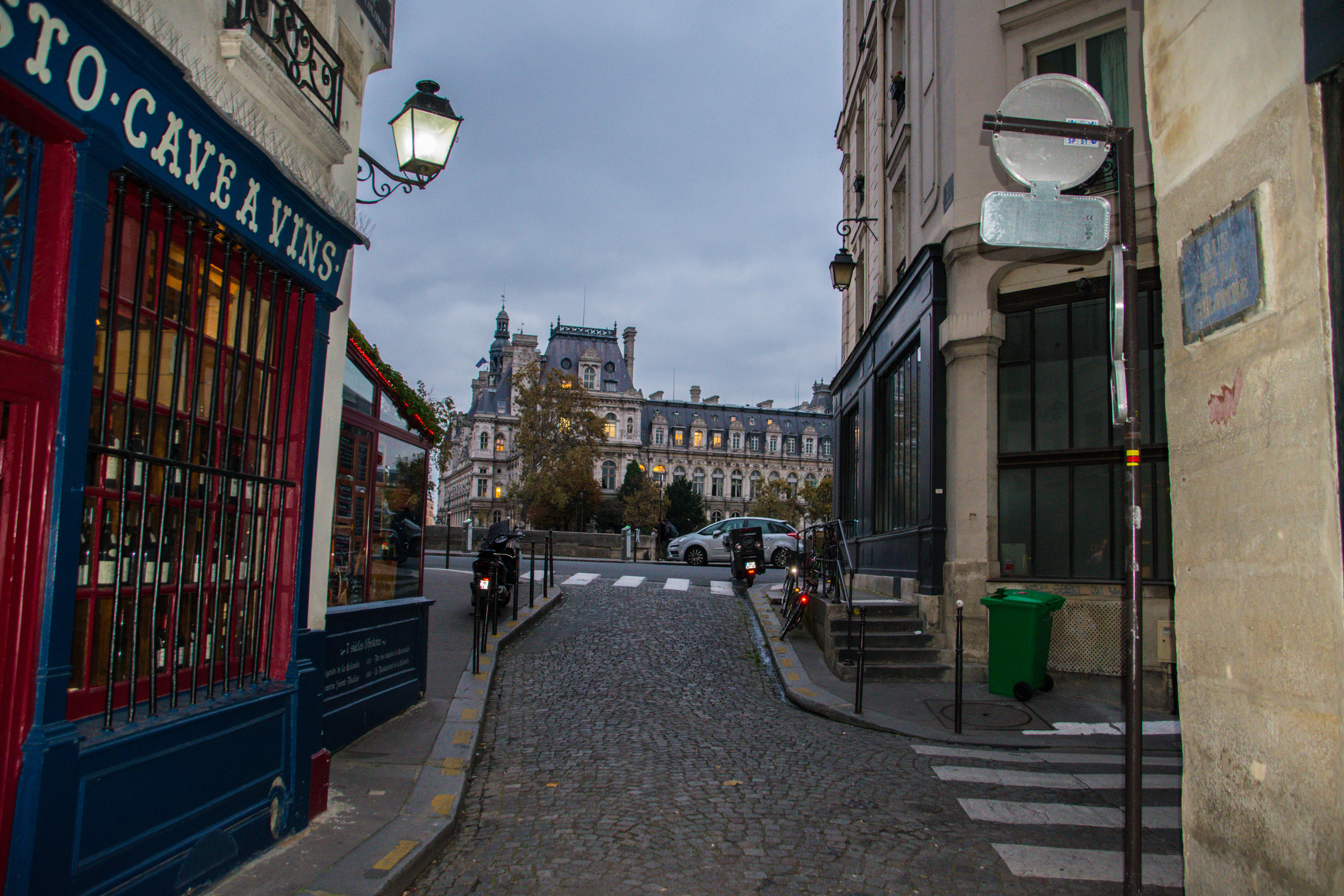 Paris, France